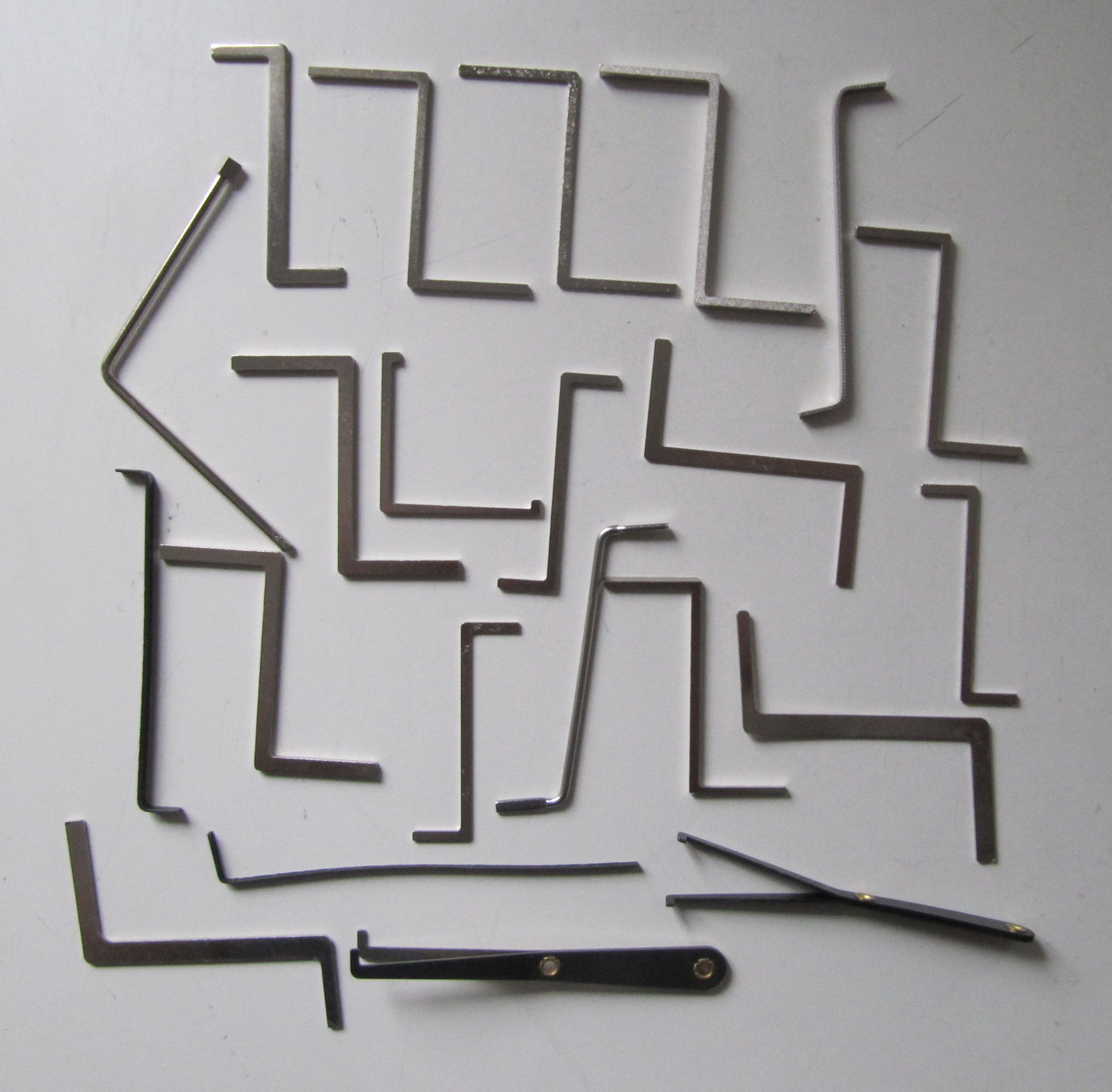 Set diverser Spanner fürs Lockpicking